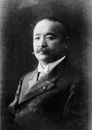 Taro Katsura (1848-1913)